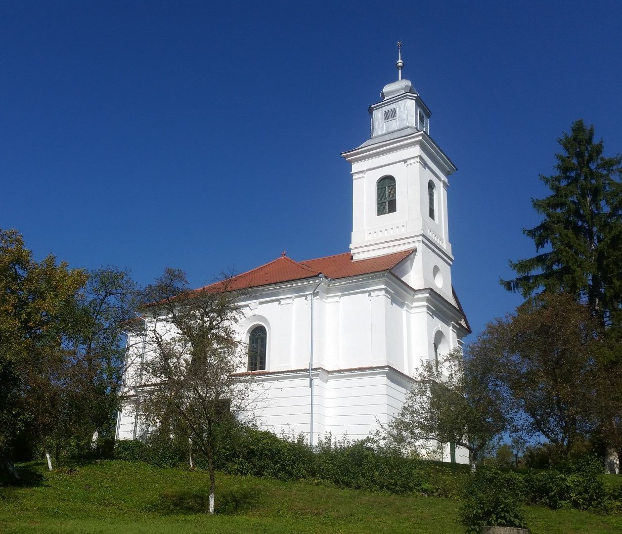 Ref. Templom